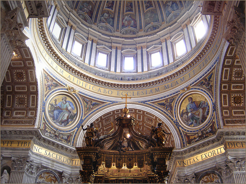 Interior of Saint Peter's Basilica, the Vatican